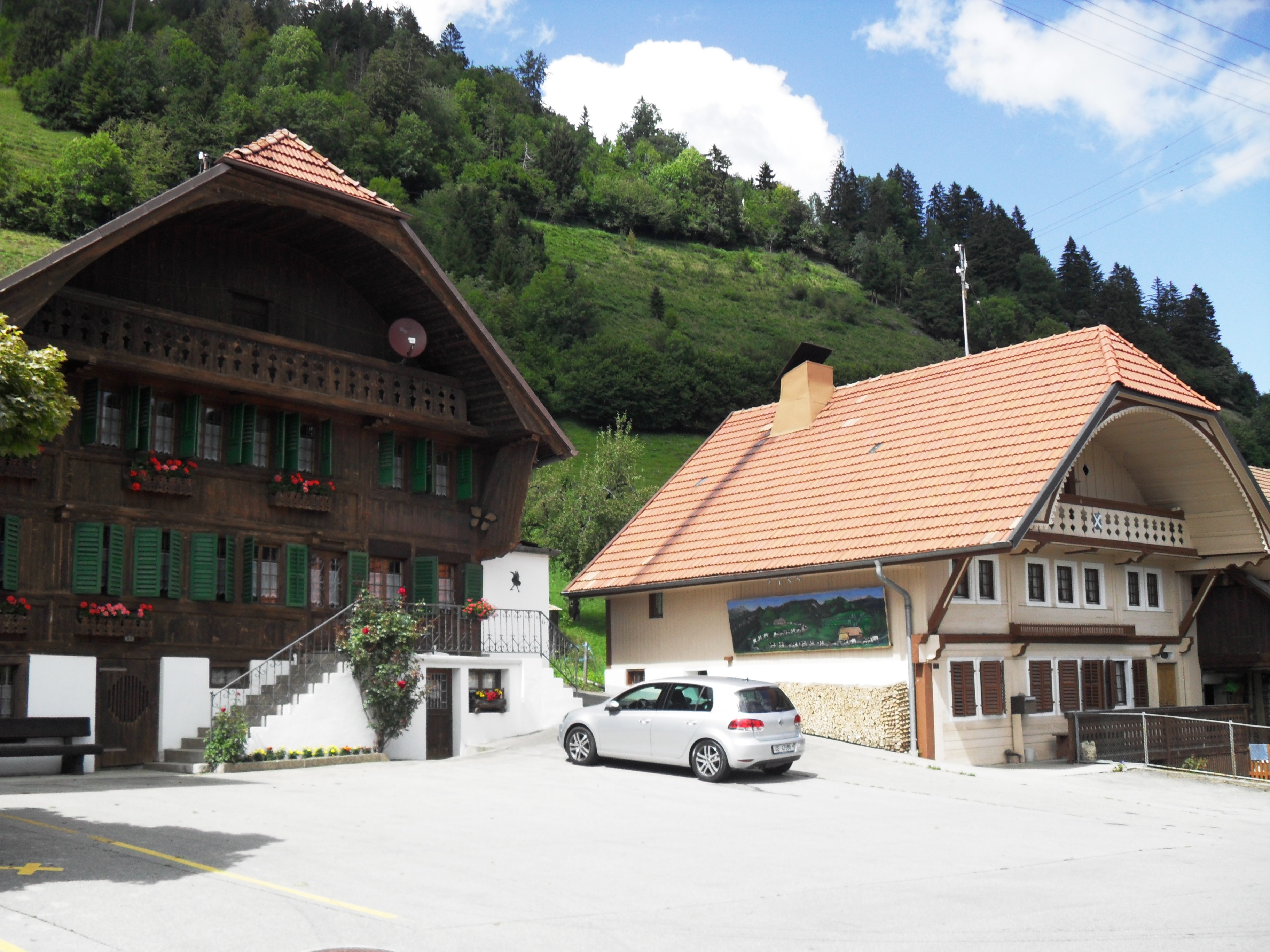 Maisons au centre du village de Cerniat Object location46° 38′ 04.38″ N, 7° 09′ 34.55″ E